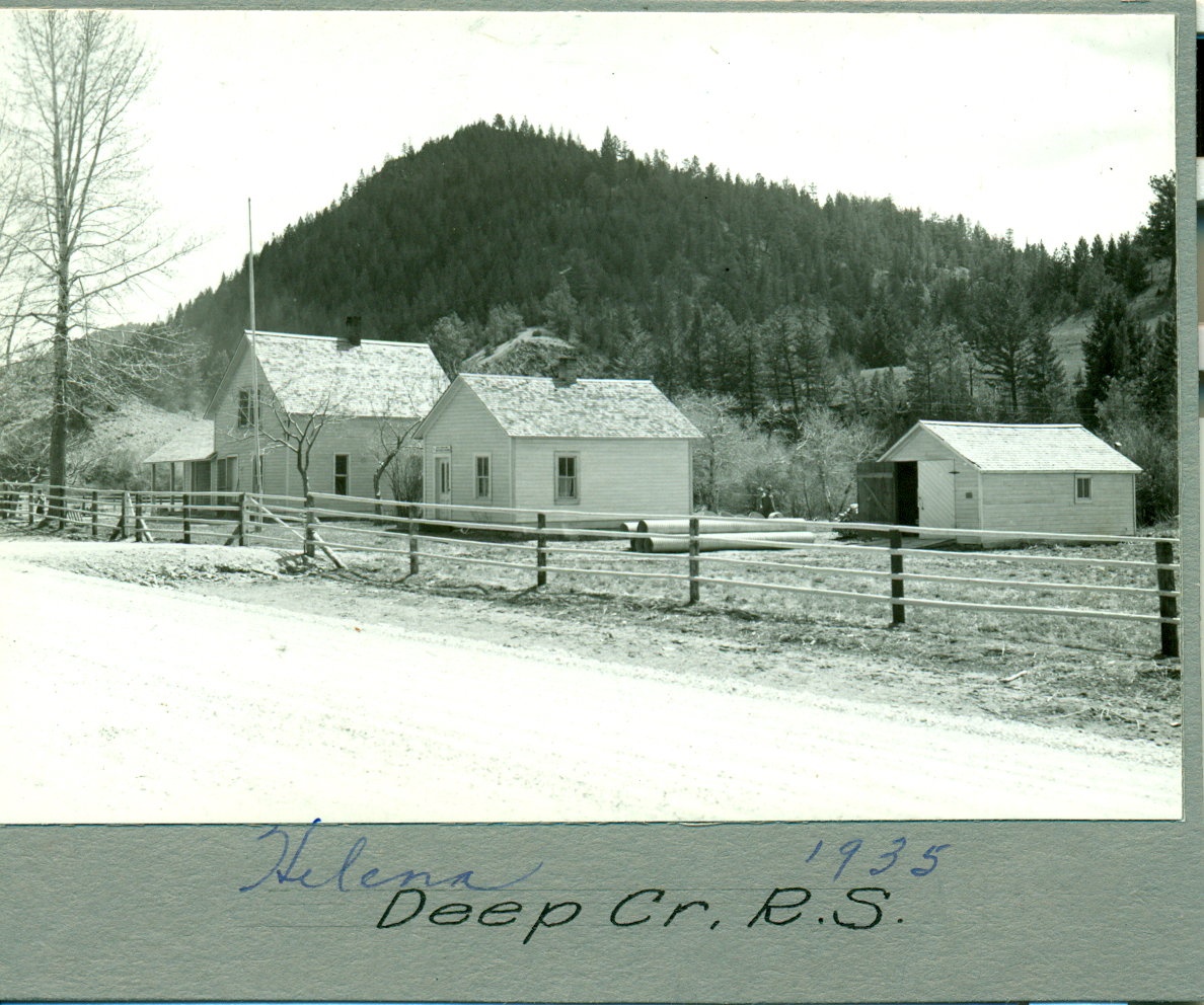 Deep Creek Ranger Station 1935